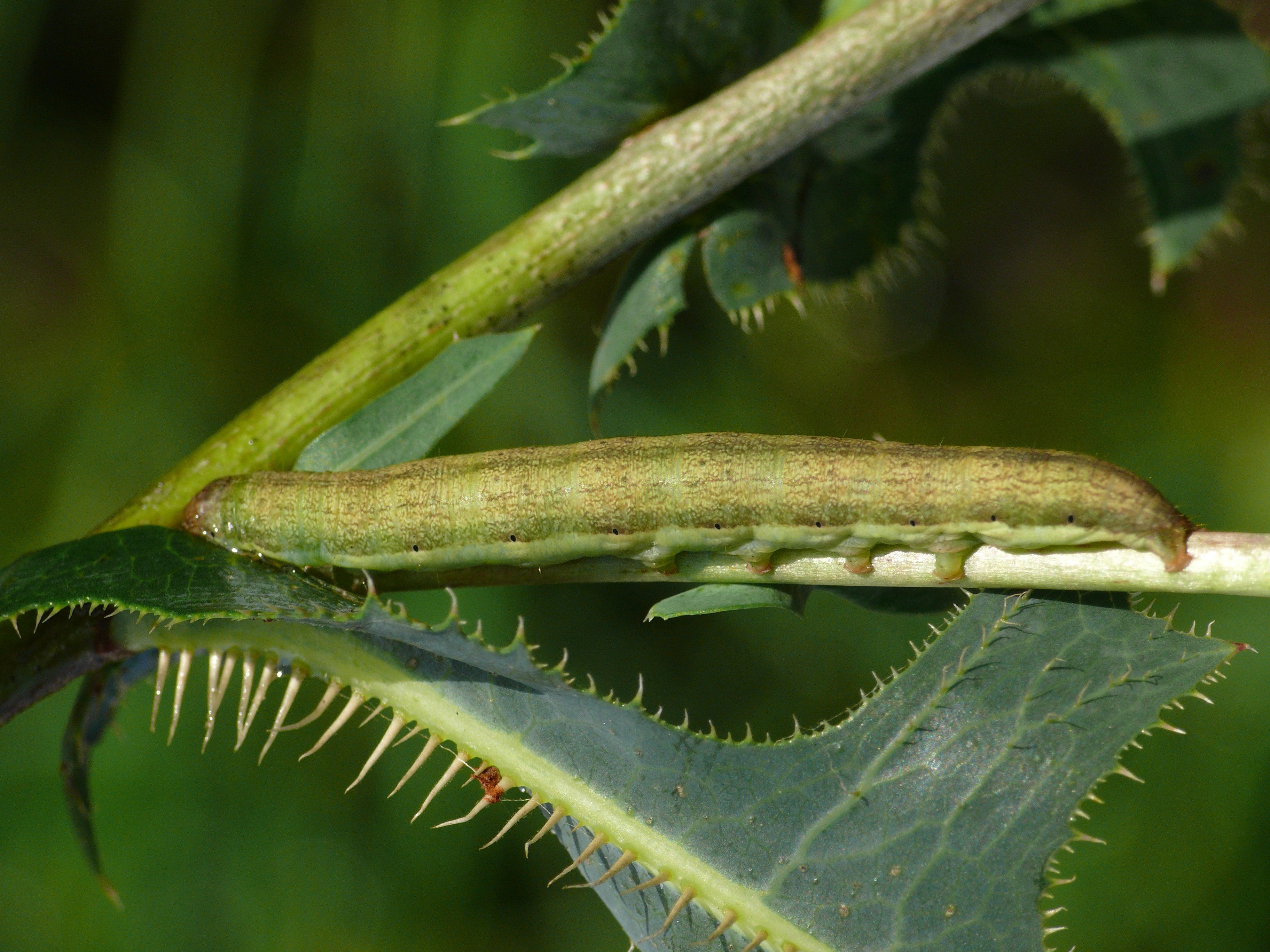 Raupe der Kompasslattich-Eule Hecatera dysodea, Münchner Umland